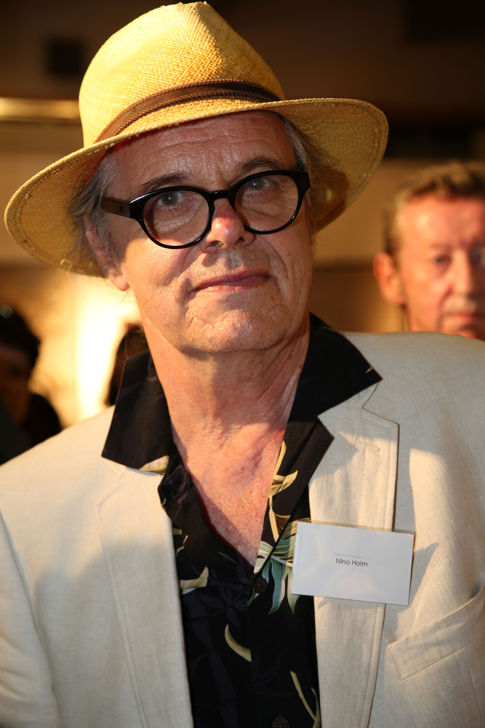 Holm_Nino-4702